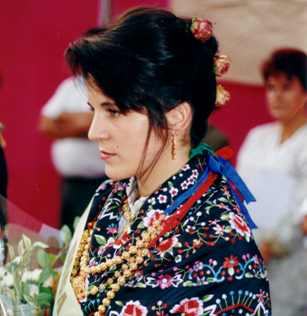 TRAJE TIPICO SERRANO